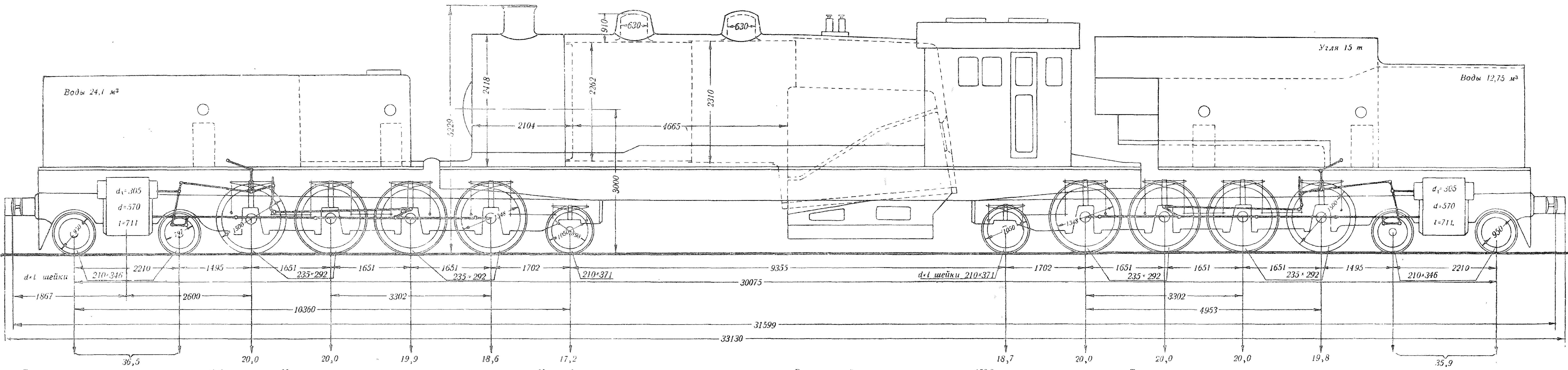 Основные размеры опытного сочленённого паровоза Я-01